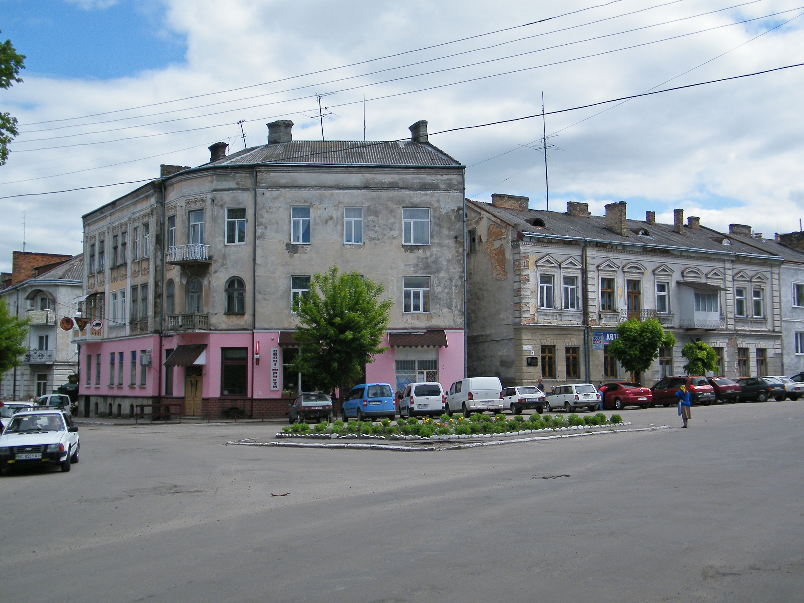 Улица города